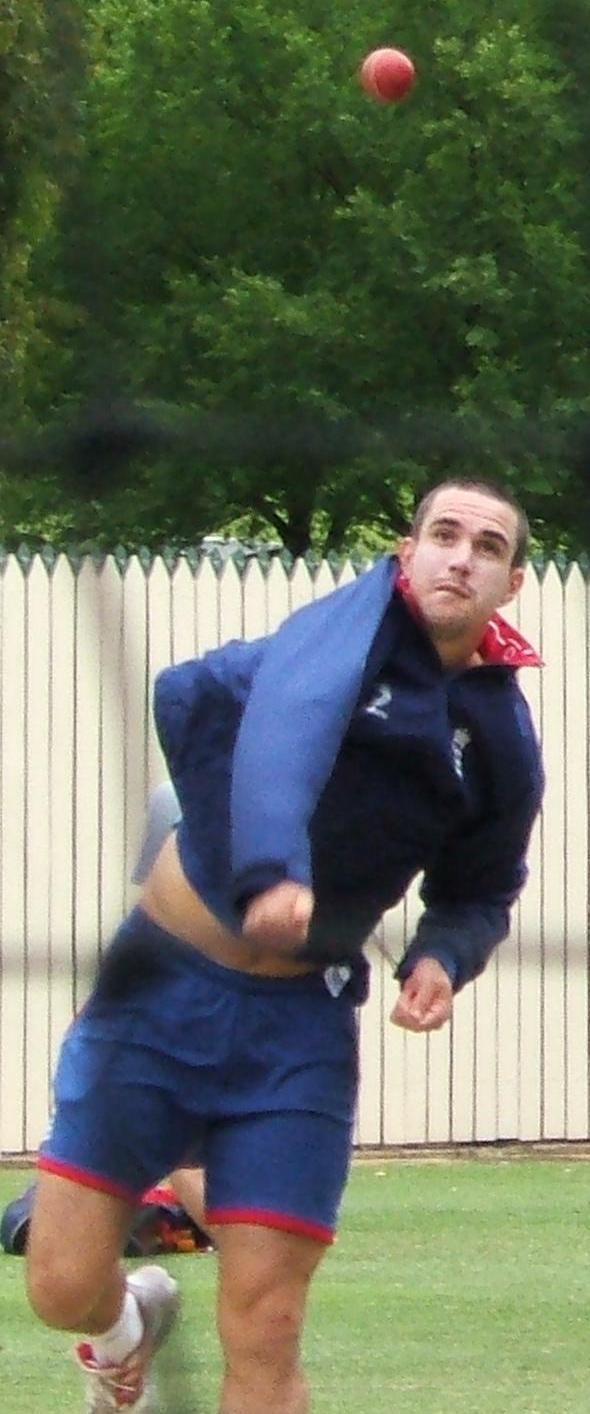 Kevin Pietersen in the nets at Adelaide Oval